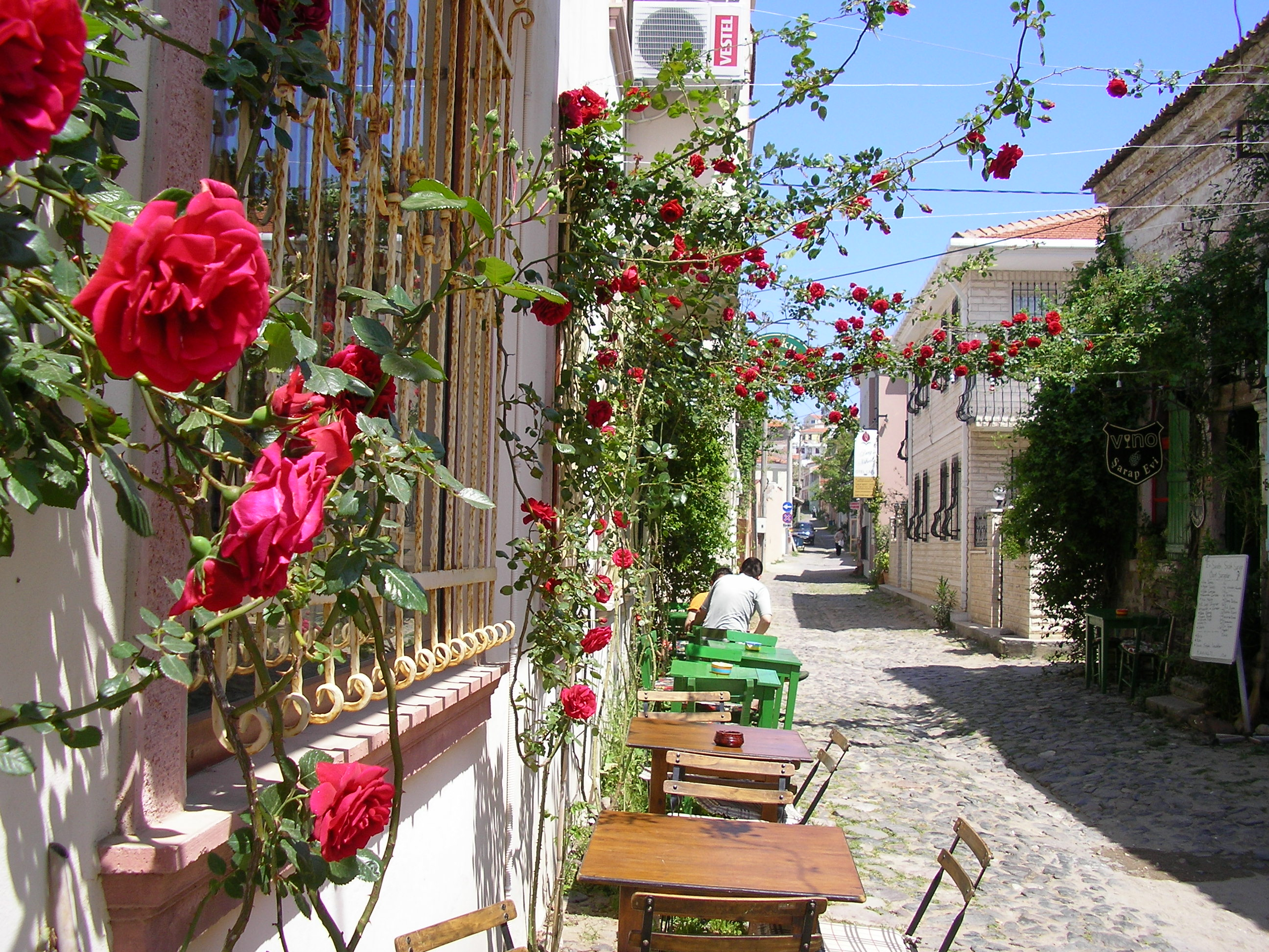 A street from Cunda Island, Ayvalik, Balikesir, Turkey